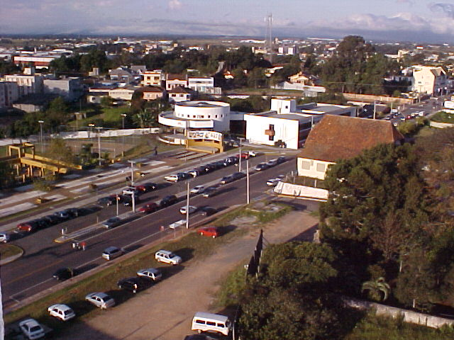 Câmara de Vereadores de São José dos Pinhais